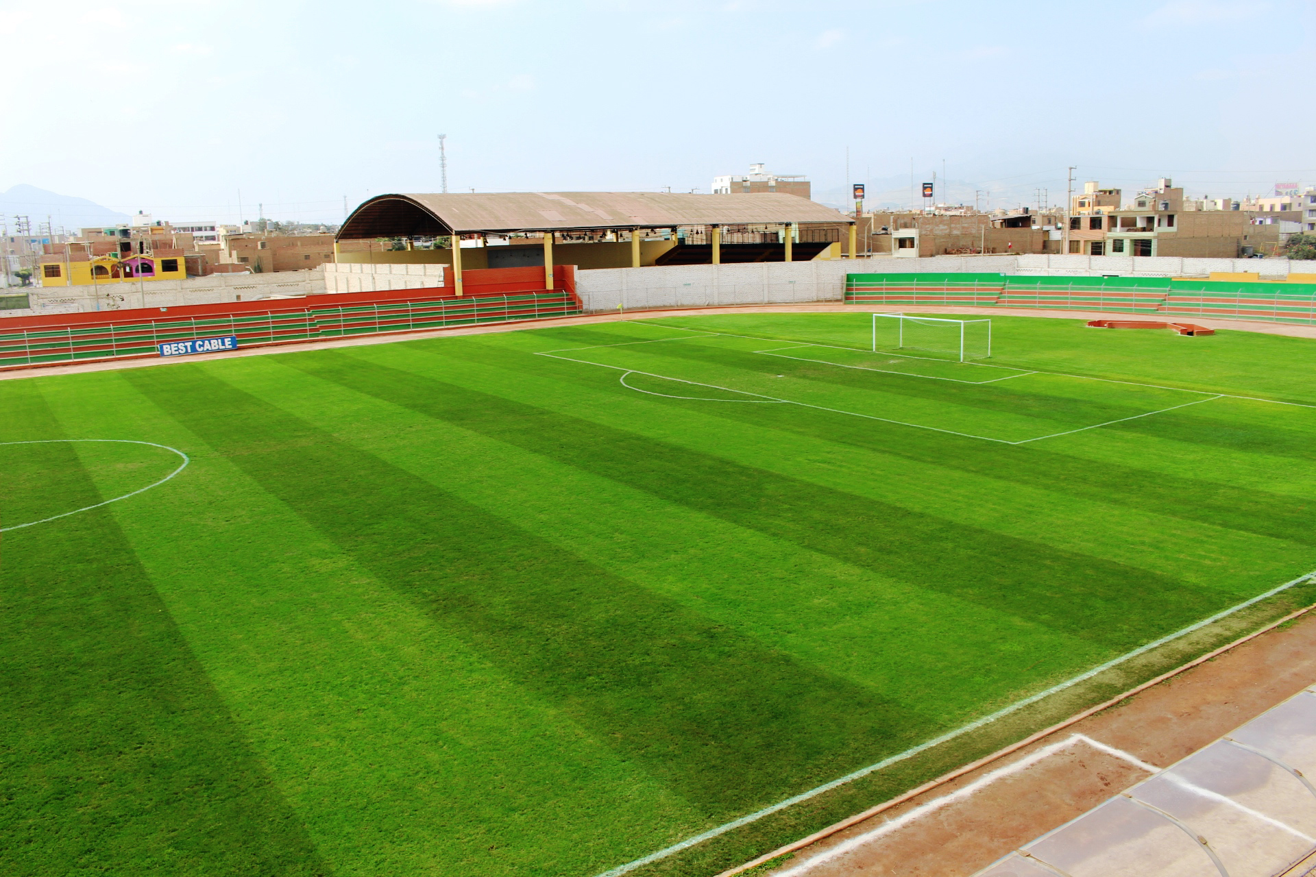 Estadio Julio Lores Colan